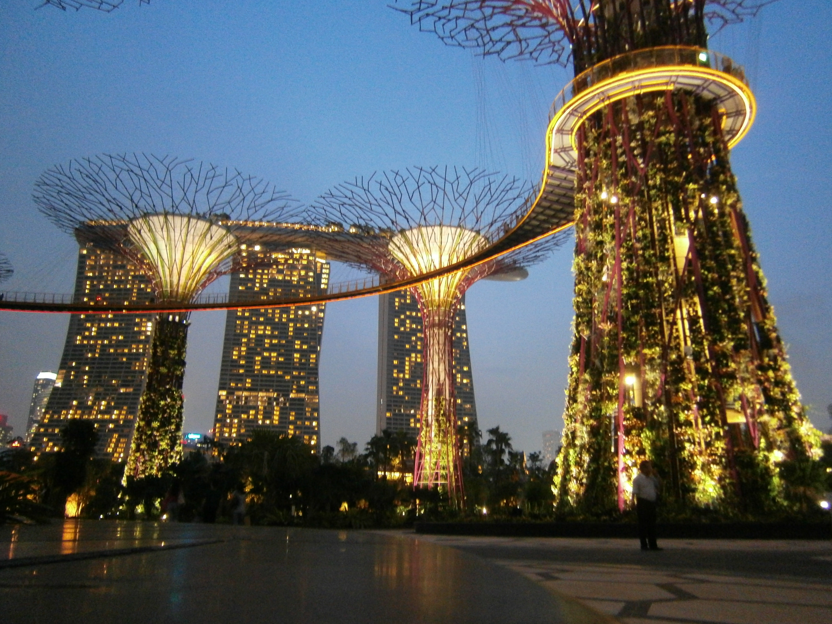 Singapore 018977